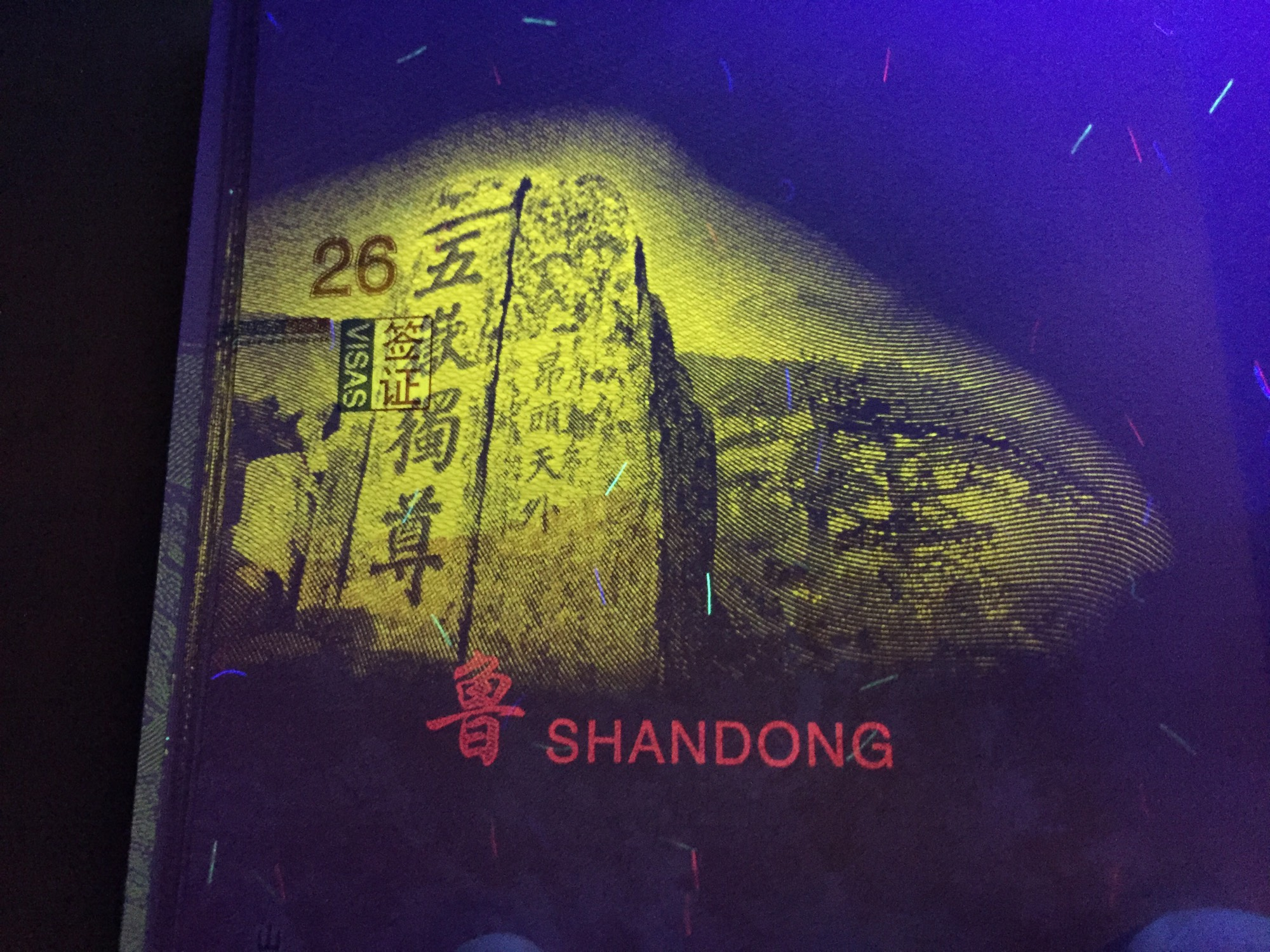 黑光灯下的中国电子护照第26页